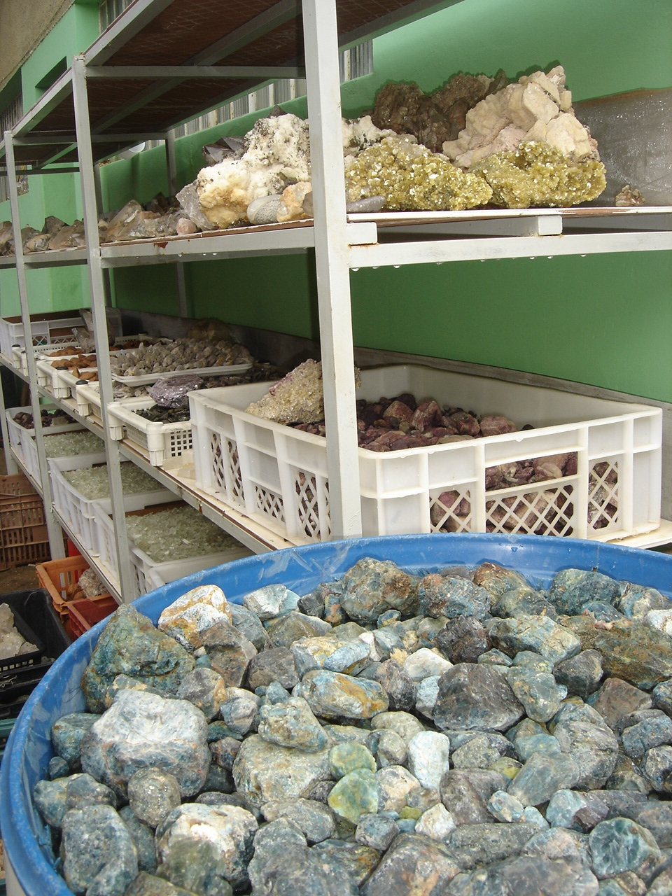 gemstones raw